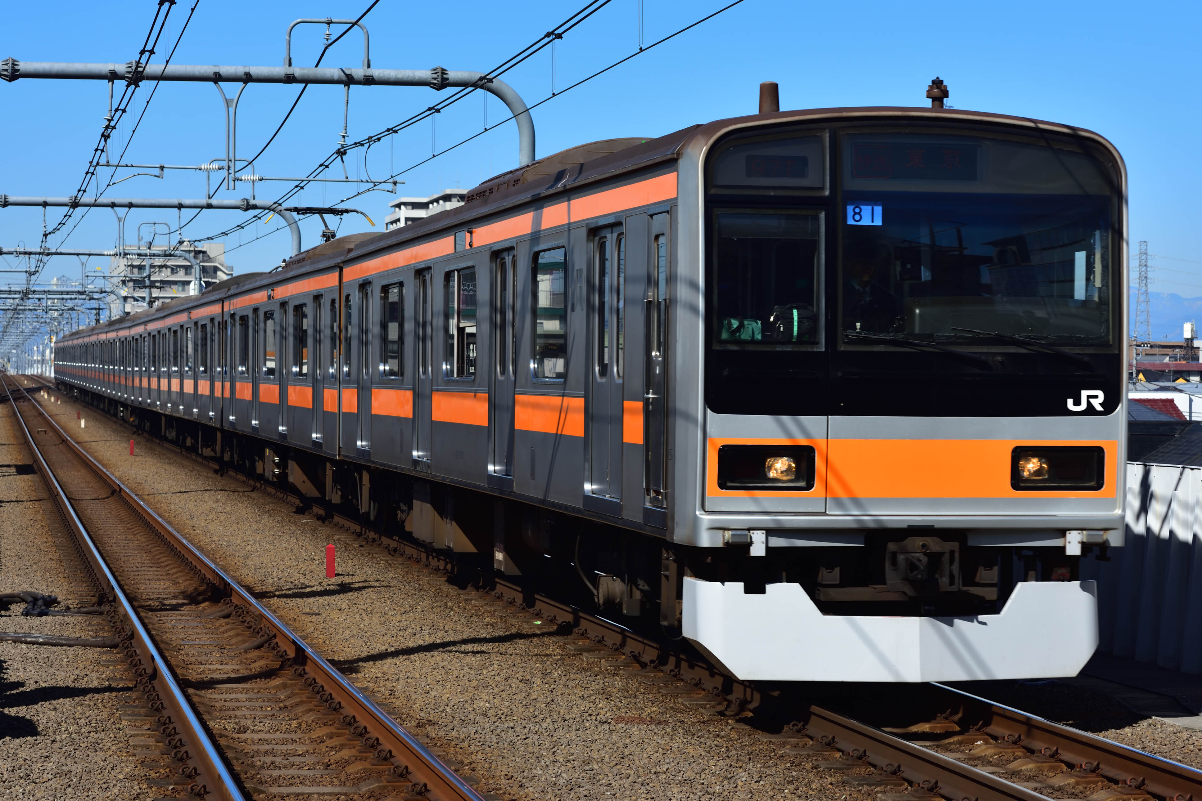 209系1000番台 中央快速線 武蔵境駅。 Nikon D750